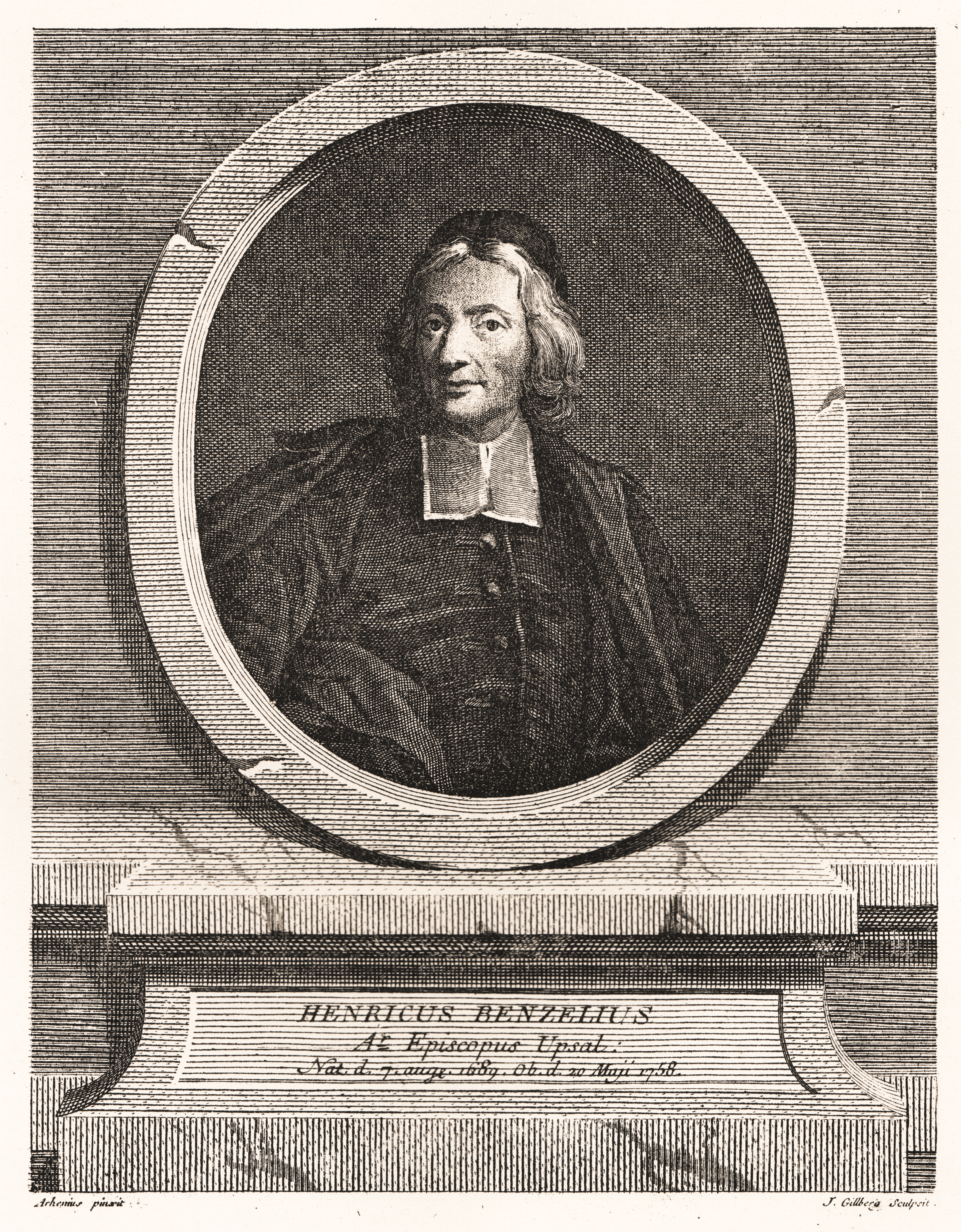 Henrik Benzelius (1689-1758). Hans porträtt har målats af Arhenius och graverats i koppar af J. Gillberg; denna gravyr åtföljer M. Asps år 1758 i Upsala utgifna likpredikan med personalier; samma bild finnes äfven i liten oval.